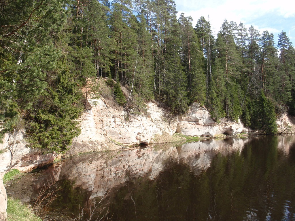 Piirioidu pae